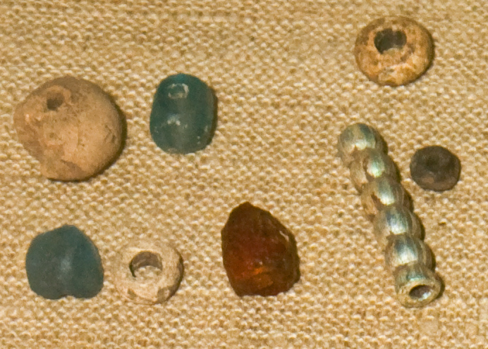 Бусы. Стекло, паста, янтарь. (VIII-IX век). Археологические раскопки 1970ых годов, городище Камно, Псковская область. Государственный музей истории Санкт-Петербурга.